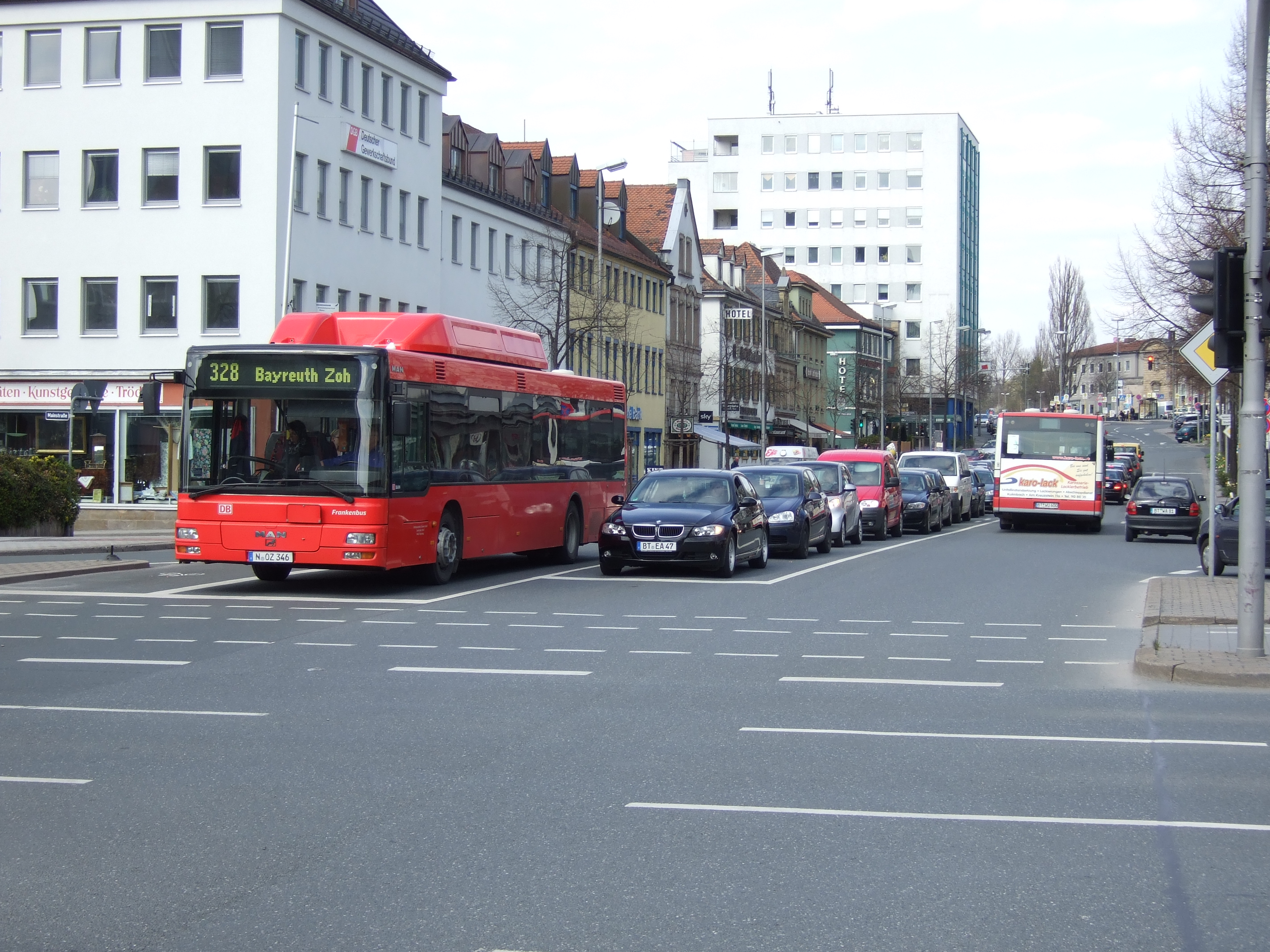 Regionalbus in Bayreuth, Bahnhofstraße